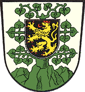 Wappen von Lindenfels